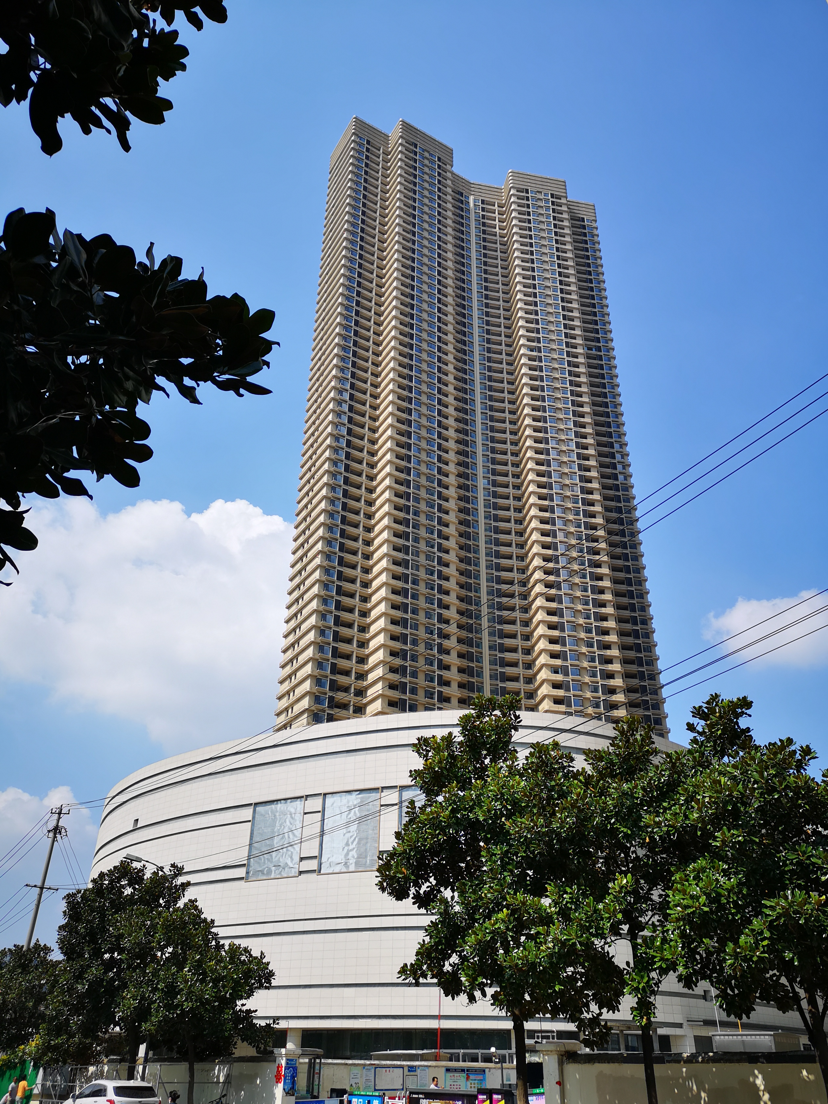 中文（中国大陆）: 坝上街环球中心R1塔楼